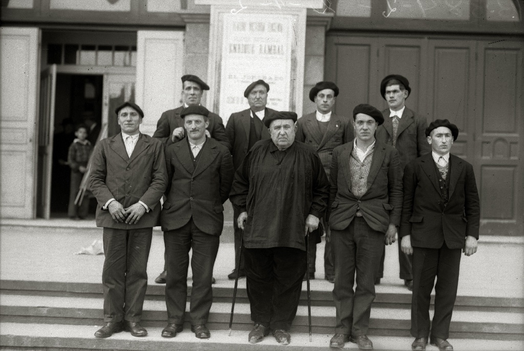 Título original: Grupo de bertsolaris posando ante la puerta del Teatro Victoria Eugenia (1/1) Localización: San Sebastián (Guipúzcoa)